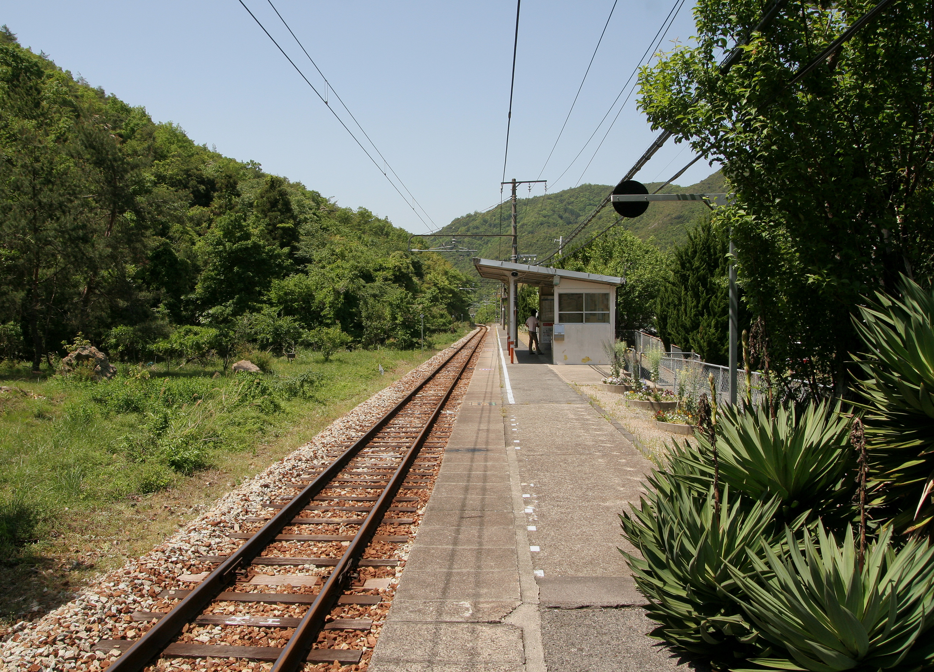 寒河駅の構内